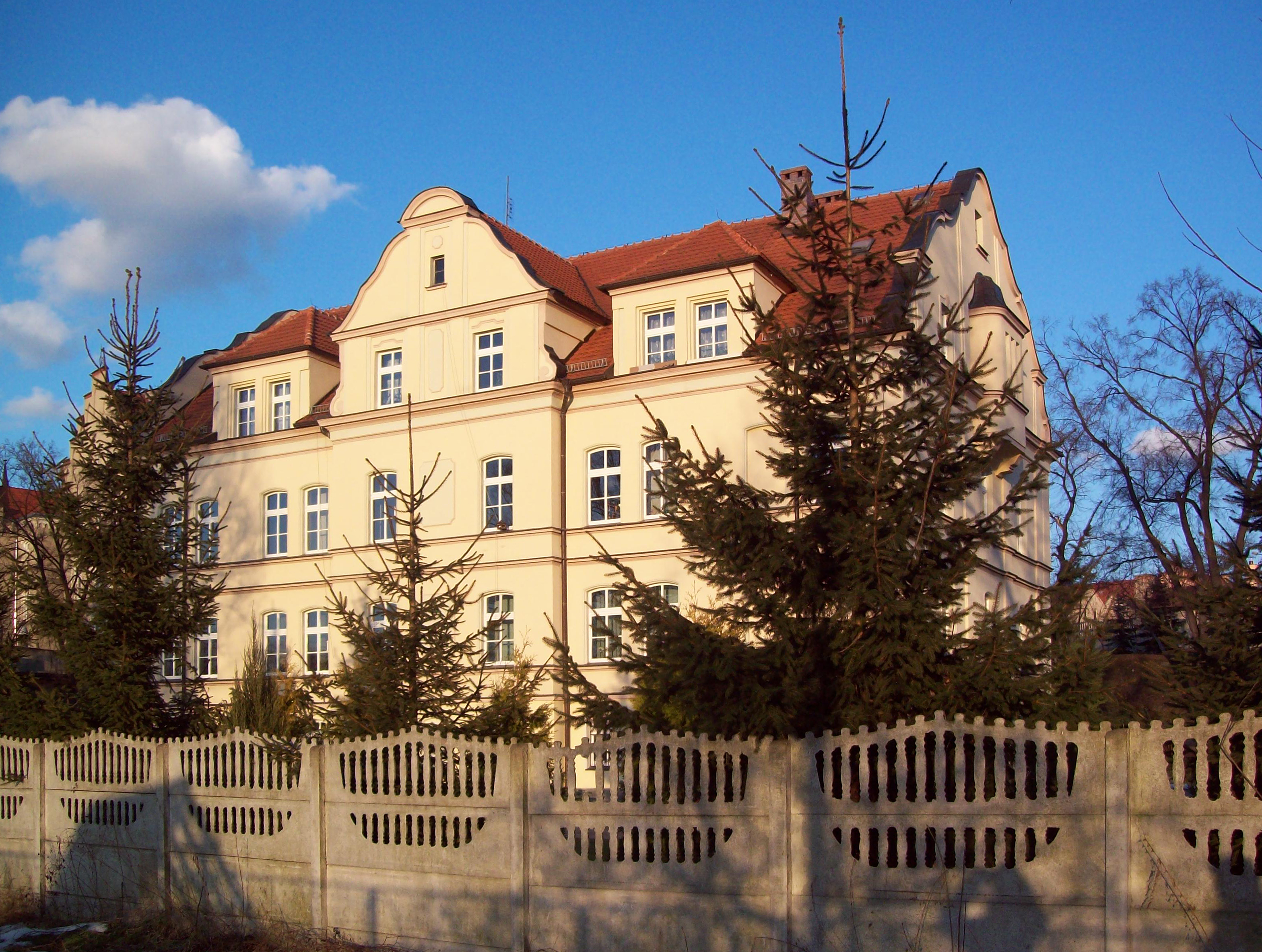 Klasztor franciszkanek szpitalnych w Kłodzku, widok od strony dworca Kłodzko Główne